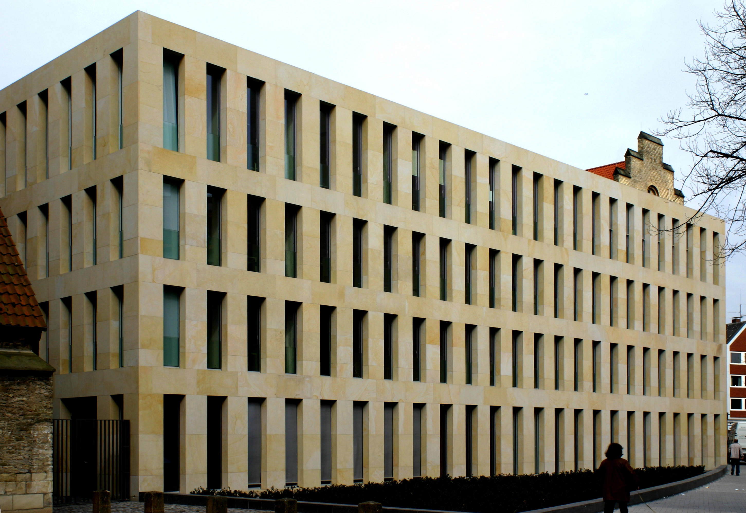 Gebäude der Diözesanbibliothek in Münster